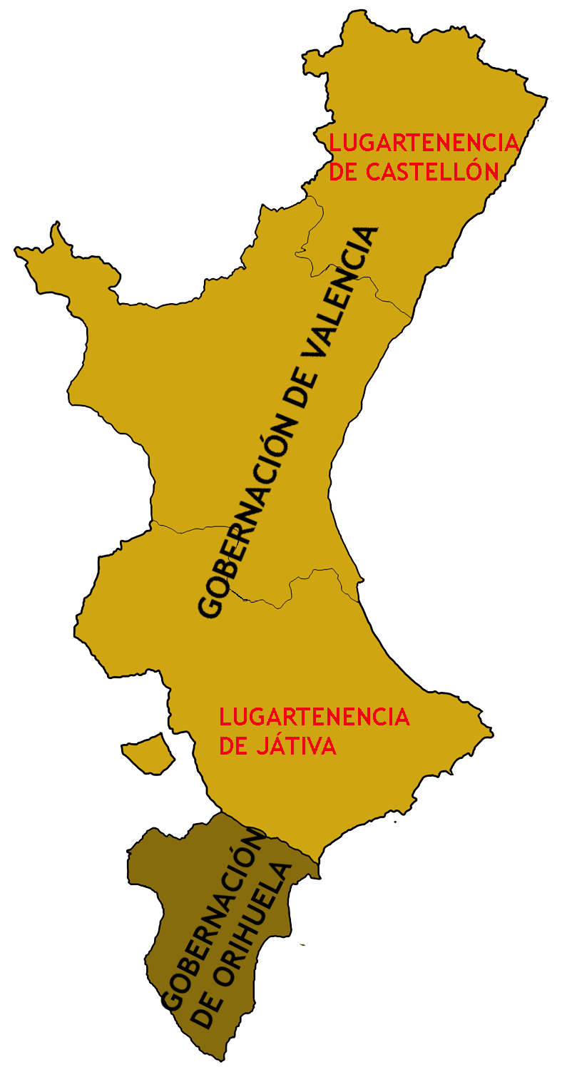 División administrativa del Reino de Valencia desde el siglo XIV hasta la primera década del siglo XVIII. La Gobernación de Orihuela, conquistada a la Corona de Castilla en 1296 y anexionada de jure en 1304, se denominó originalmente Procuración general de Orihuela o demarcación Ultra Saxonam. En 1363 se convirtió en Gobernación General, con lo que el Reino de Valencia se dividió en dos Gobernaciones; la más grande de ellas, la de Valencia, se subdividía a su vez en tres lugartenencias, la propia de Valencia, más la de Játiva y la de Castellón A principios del siglo XVIII se realizó una modificación profunda de la administración del Reino, que quedaría dividido en trece corregimientos.